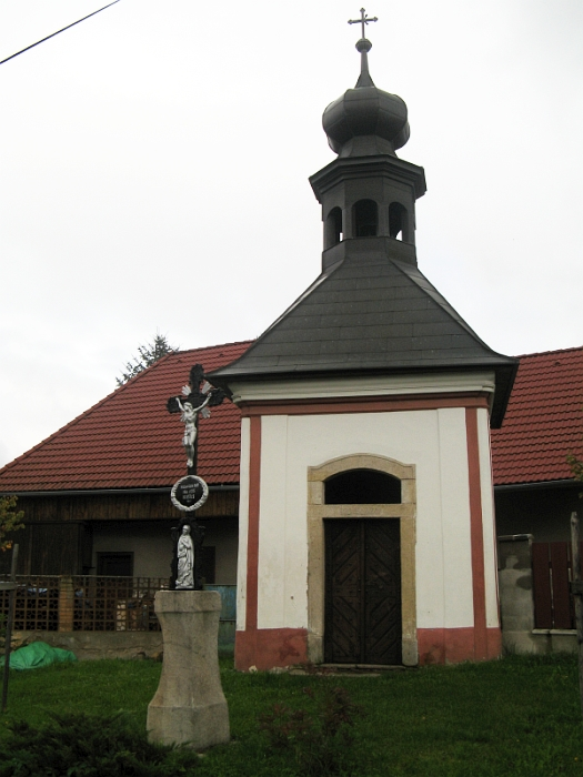 Kaple Panny Marie, při čp. 24, Bednárec.